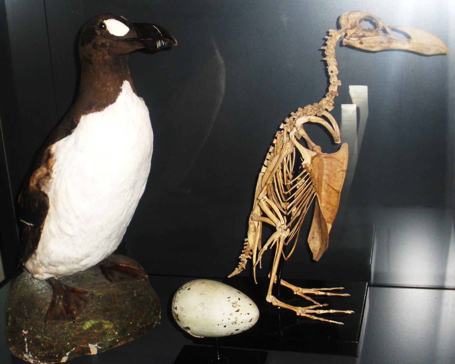 Stuffed specimen (Bird no. 39, the Frankfurt Auk), skeleton, and replica egg of Alca impennis, an extinct bird- Took the photo at Senckenberg Museum of Frankfurt